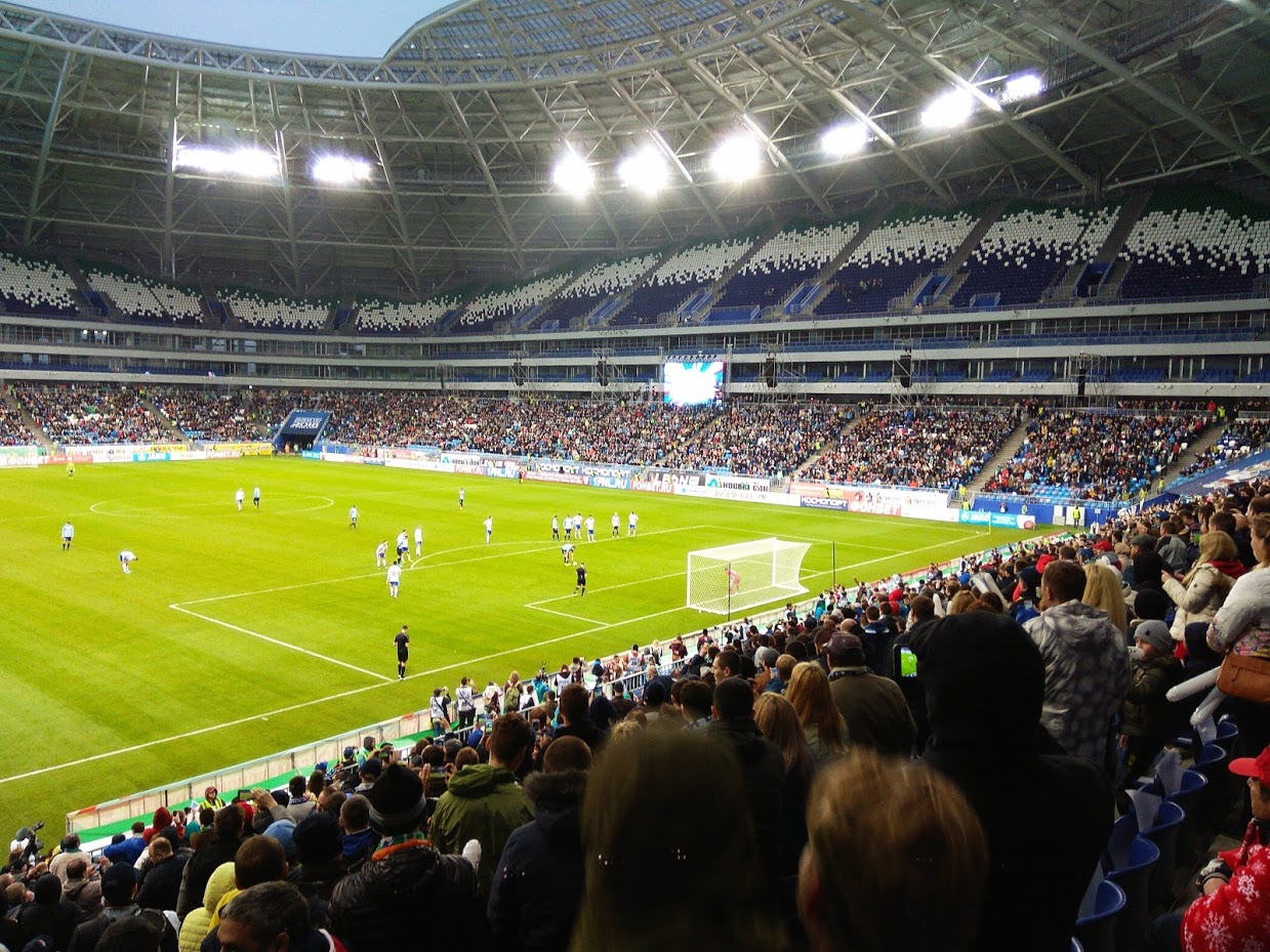 Крылья Советов - Факел